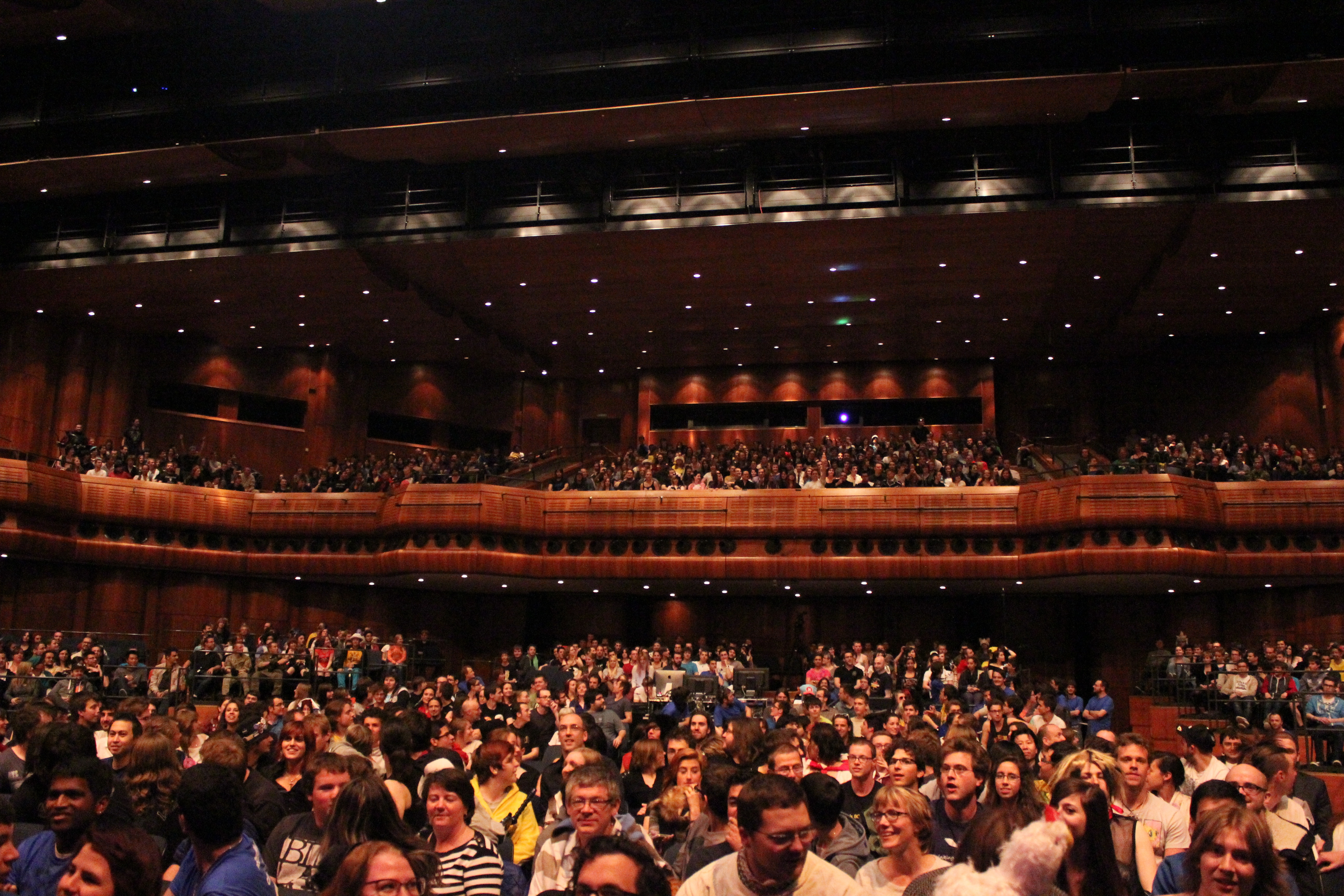 Le Naheulband en concert à l’Auditorium Stravinski à Montreux (Suisse), pendant Polymanga, le 20 avril 2014.